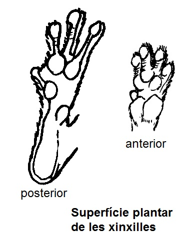 Superfície plantar de les xinxilles. Comparació de la posterior i l'anterior.